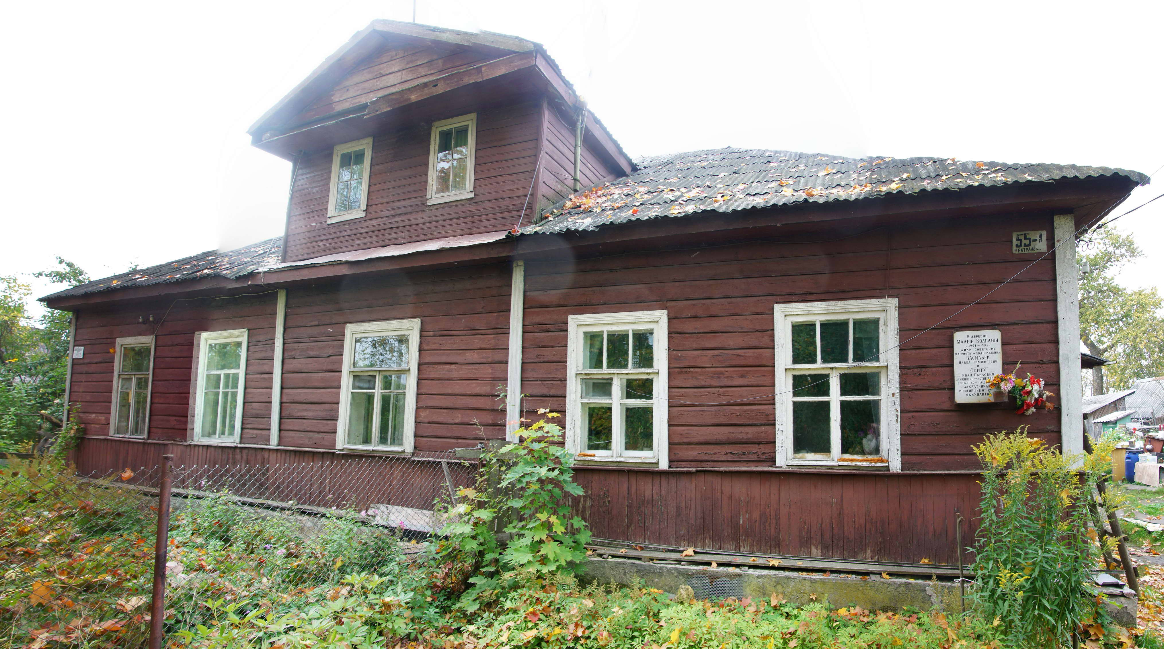 Деревня Малые Колпаны, бывший постоялый двор с мемориальной доской.